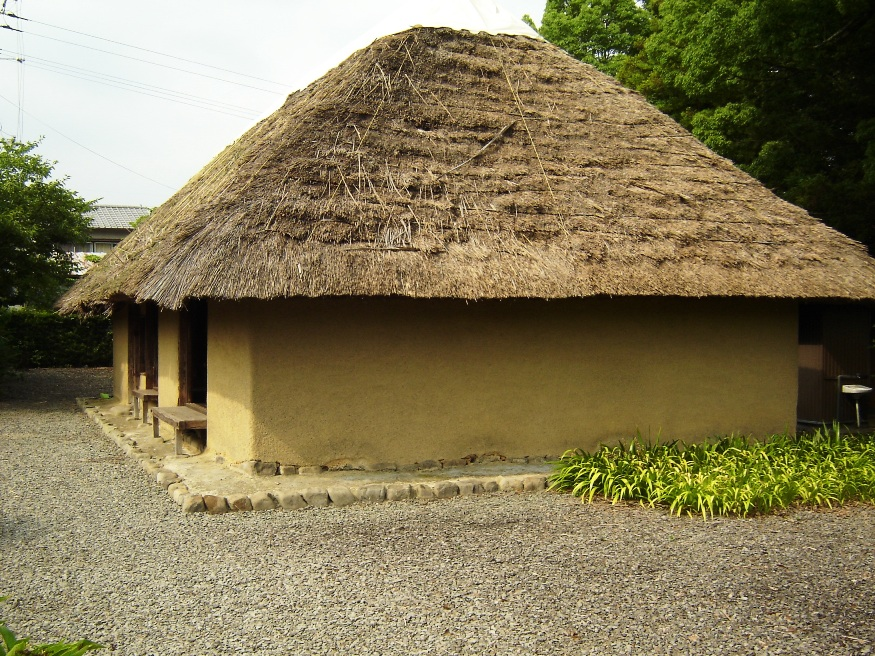 The Old Nagaoka Family Residence in Mima, Tokushima-ken, Japan